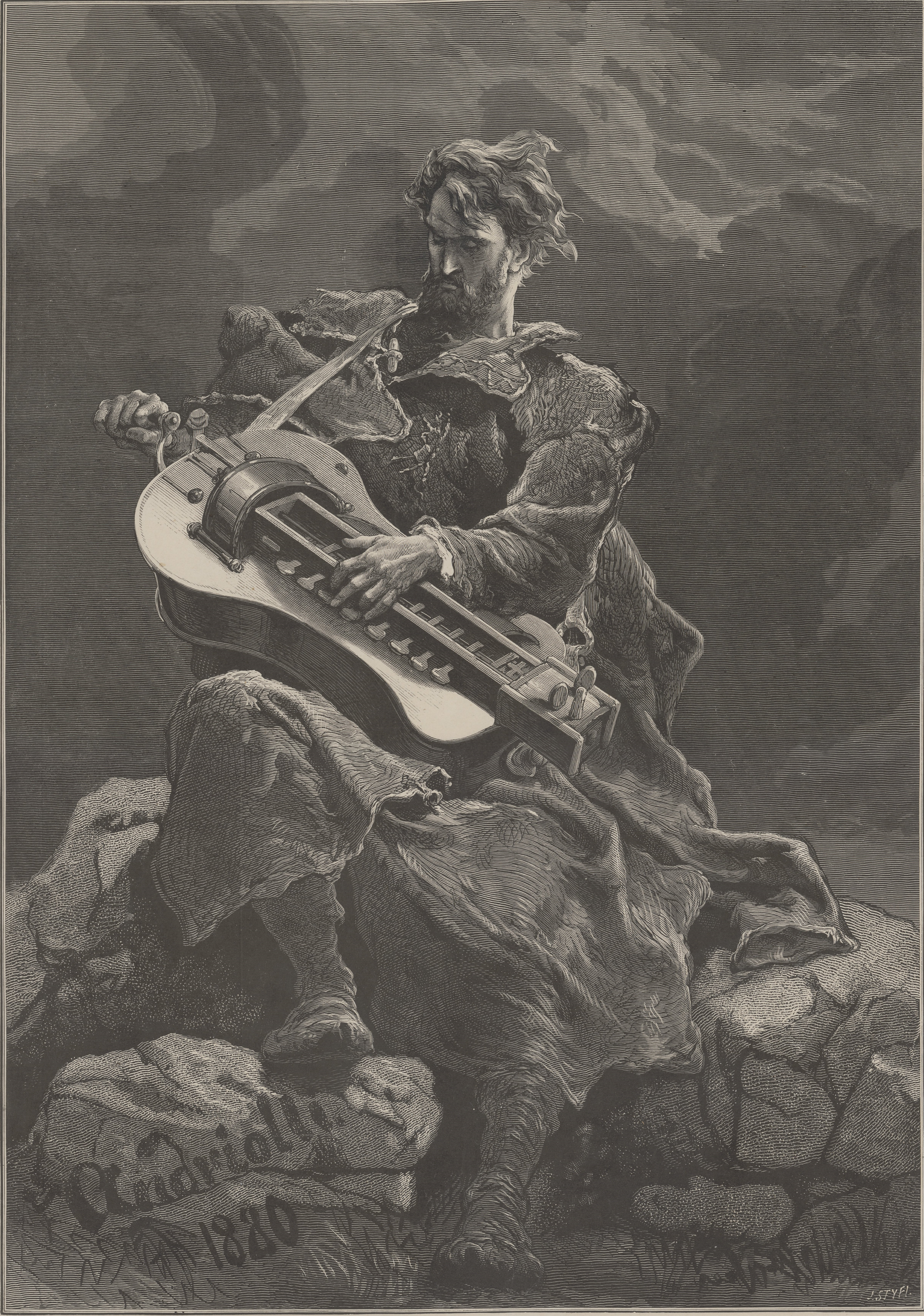 Lirnik wioskowy (do utworu Syrokomli) / wycinał Jan Styfi ; rysował Andriolli